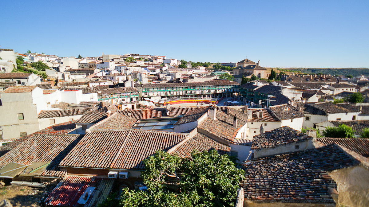 Un Día en Chinchón Puedes ver la entrada completa en